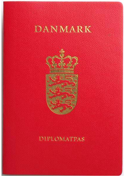 Dansk diplomatpas